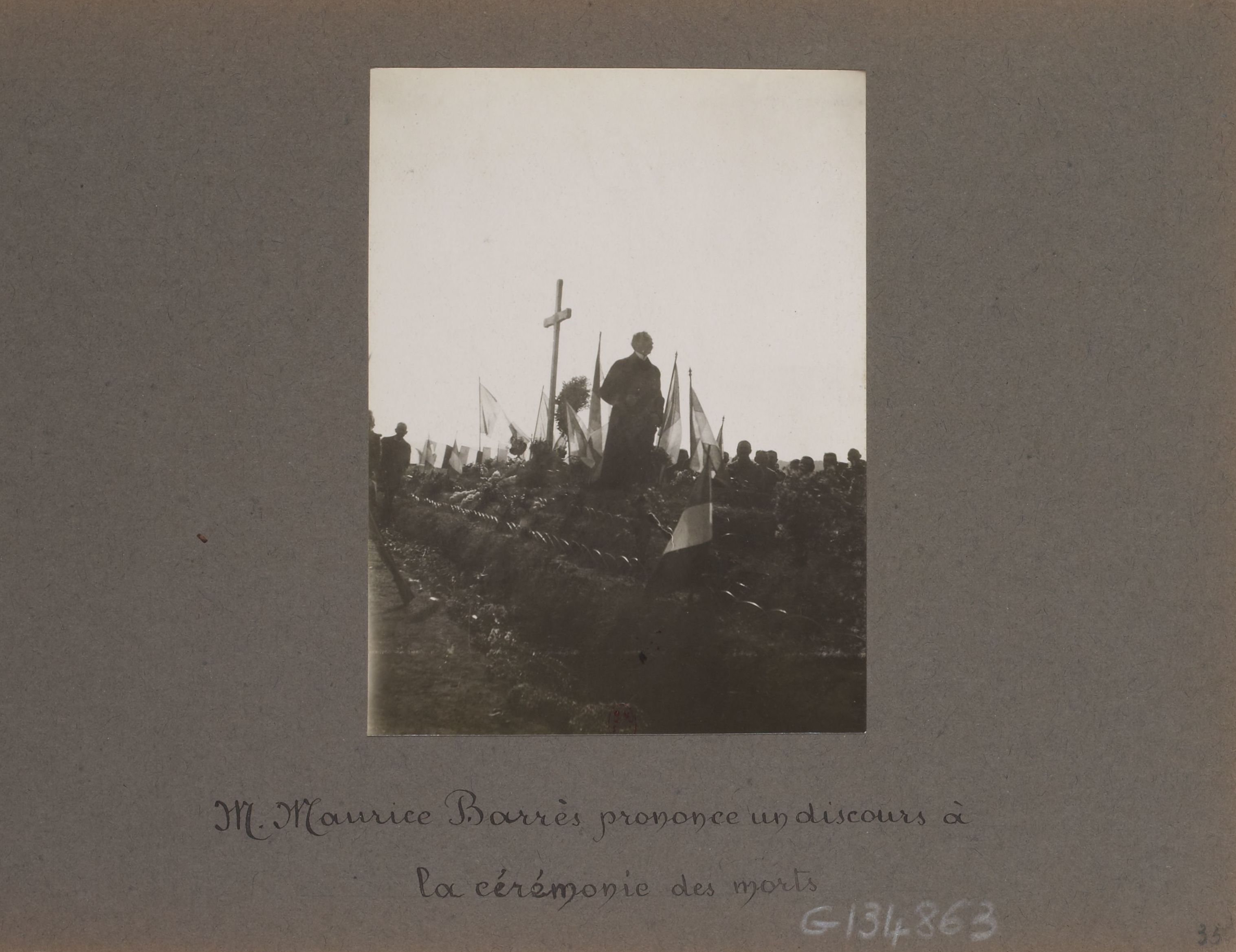 Visite de Maurice Barrès sur le front des Vosges, octobre-novembre 1914. Maurice Barrès prononce un discours à la cérémonie des morts près de Gerbéviller (Meurthe-et-Moselle).